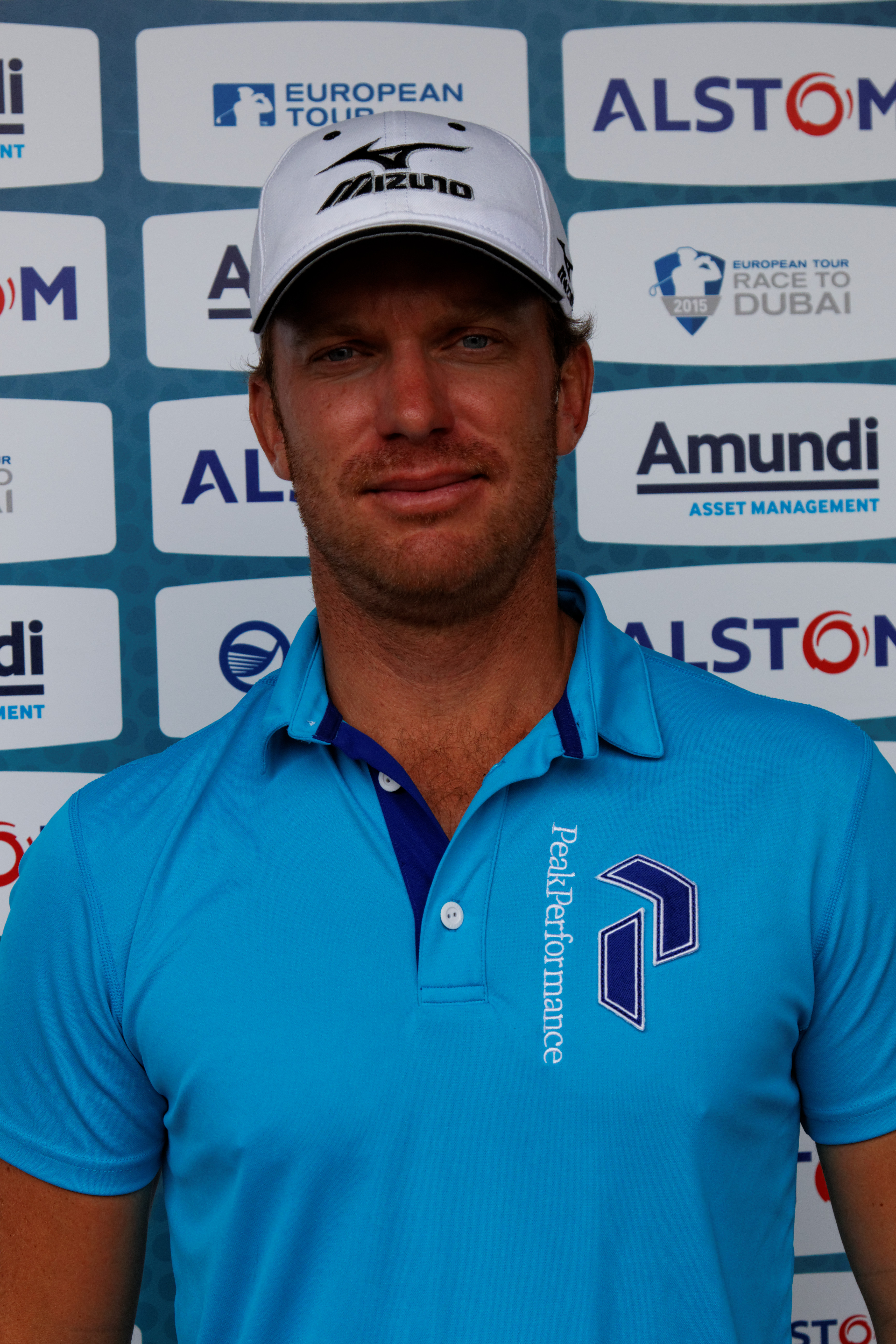 Image prise lors de l'Alstom - Open de France 2015 (4ème tour)